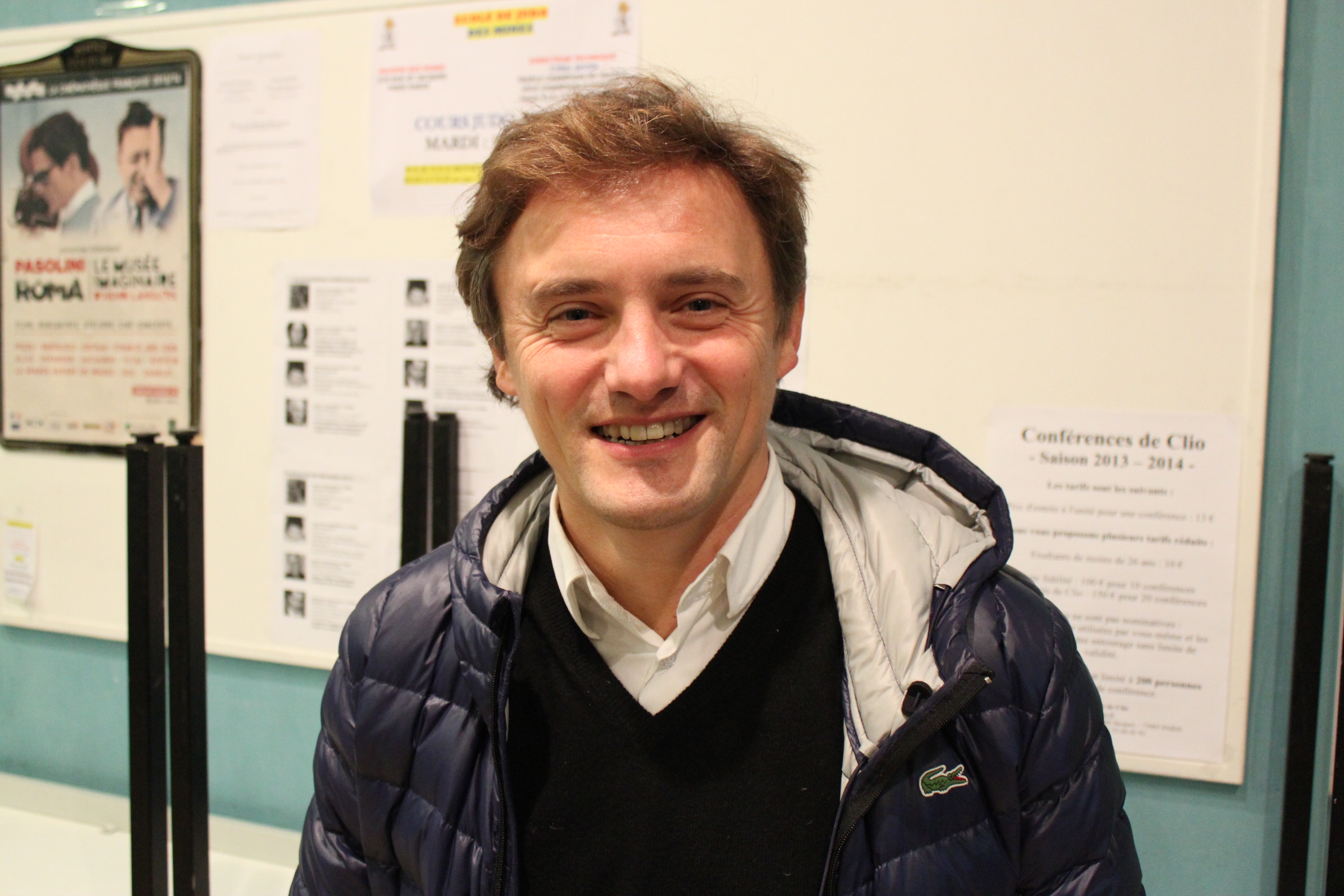 Alexandre Gillet au 10ème Salon des Séries et du doublage - 2013